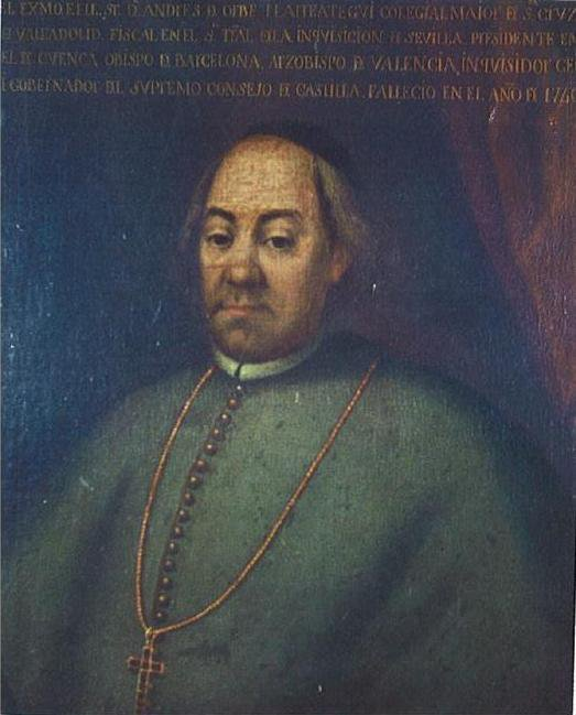 Cardenal Andrés de Orbe y Larreategui, Fuente: DE URÍA, J.I.; ETXEBERRIA, L.; ODRIOZOLA, I.E.; URCOLA ANSOLA, M. (1977). “Casa – Torre de Emparan, Azpeitia”, Publicación de la Caja de Ahorros Municipal de San Sebastián.